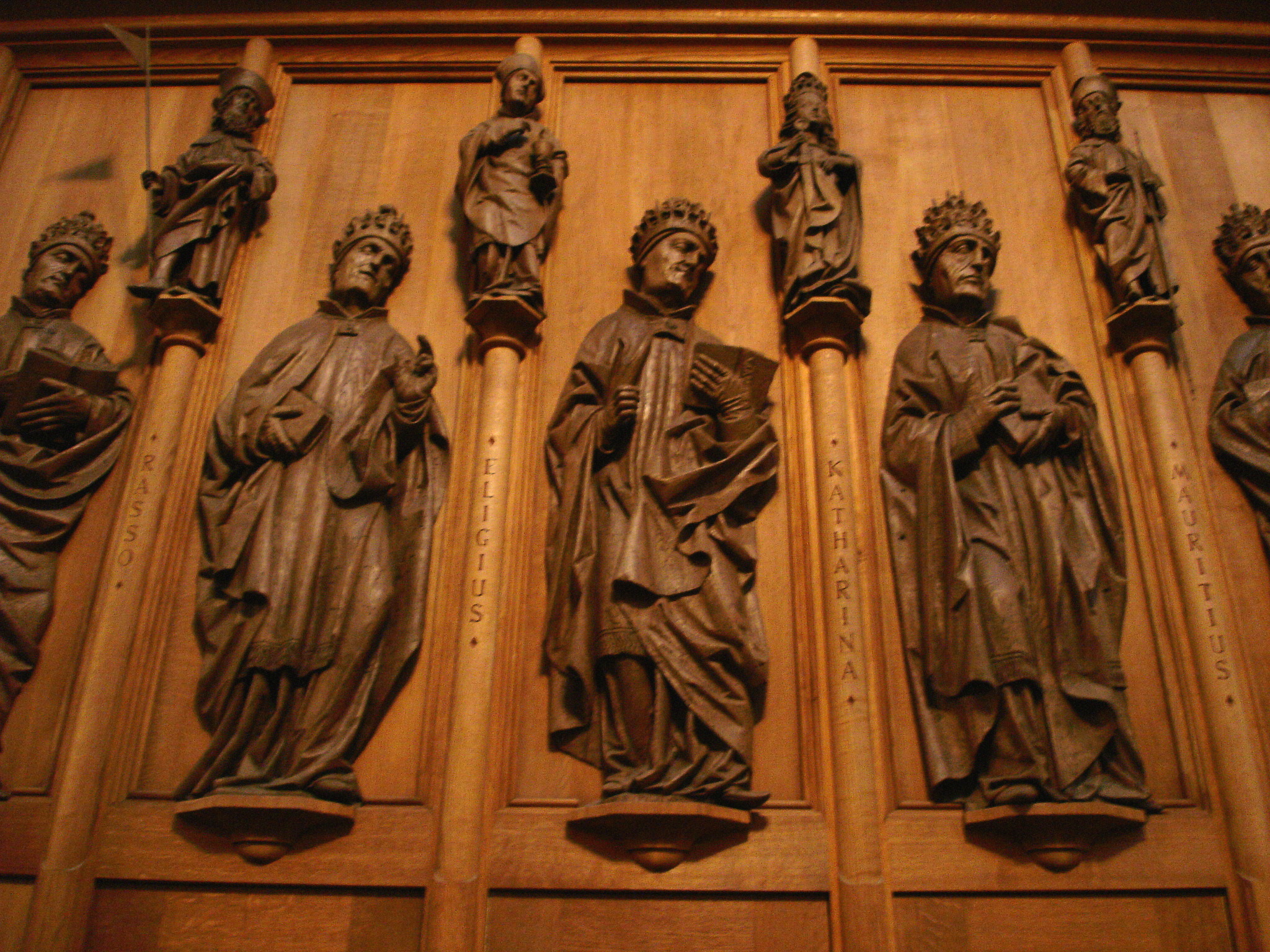 Detail des äußeren des Chorgestühls in der Frauenkirche